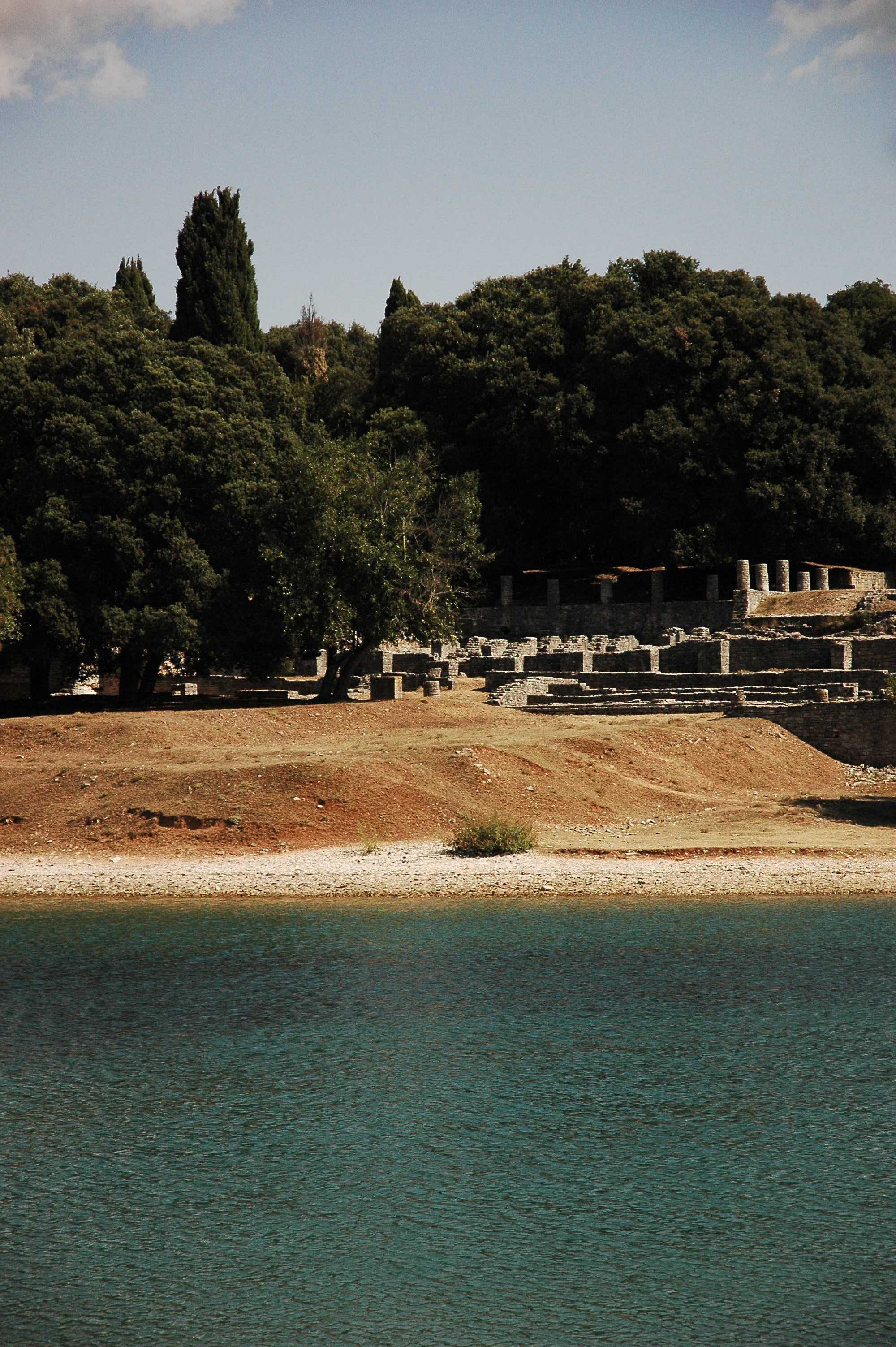 Parc national de Brijuni